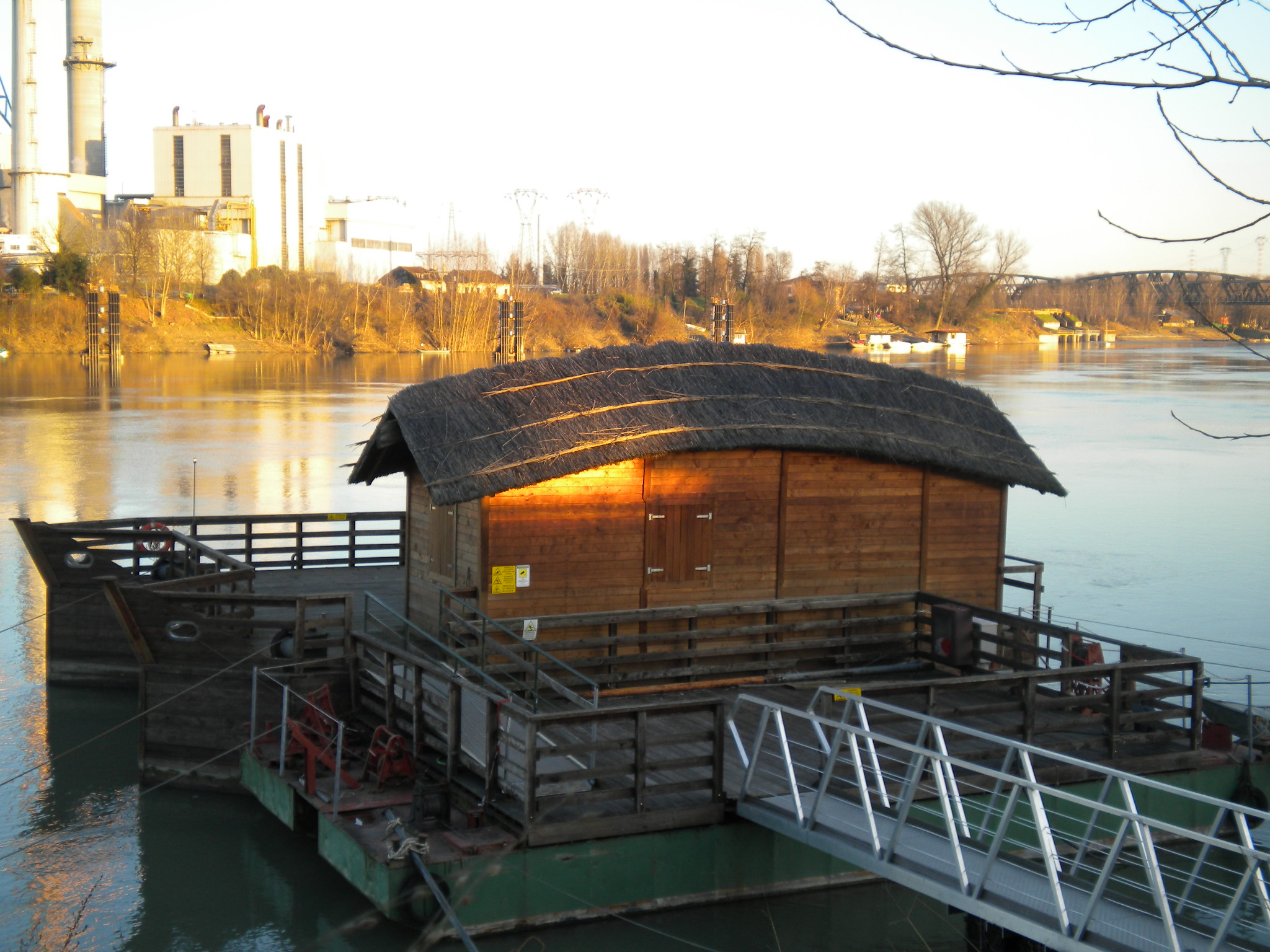 Mulino Natante ricostruito. Italia, Mantova, Revere, Po.